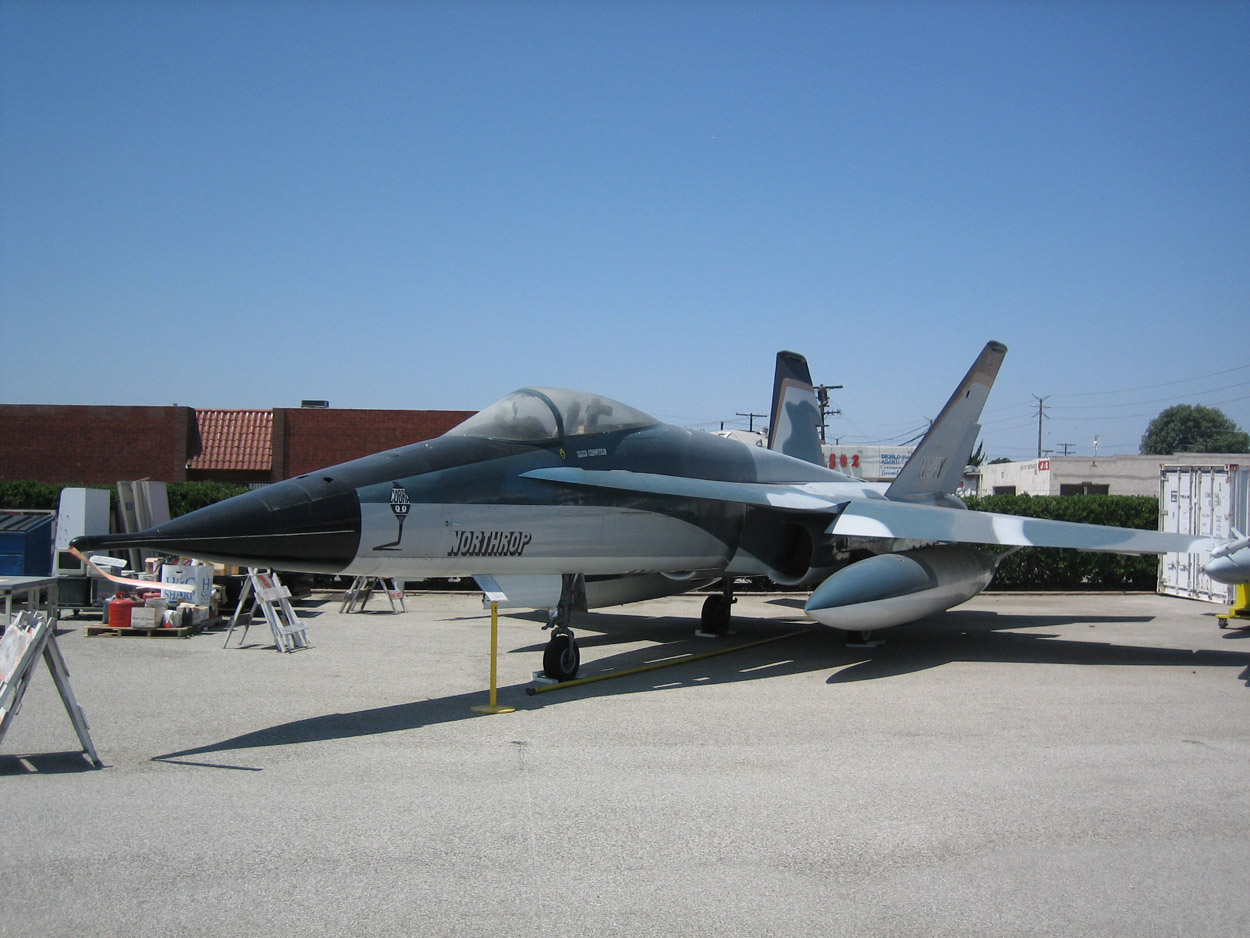 Photo du prototype N°1 du Northrop YF-17 Cobra prise au Western Museum of Flight de Torrance, Californie